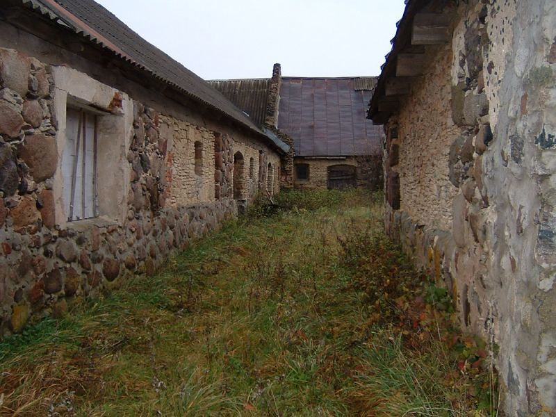 Noriūnų dvaro kumetyno fragmentas